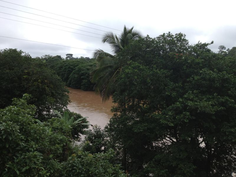 Bosque tropical húmedo en la rivera del río San Carlos